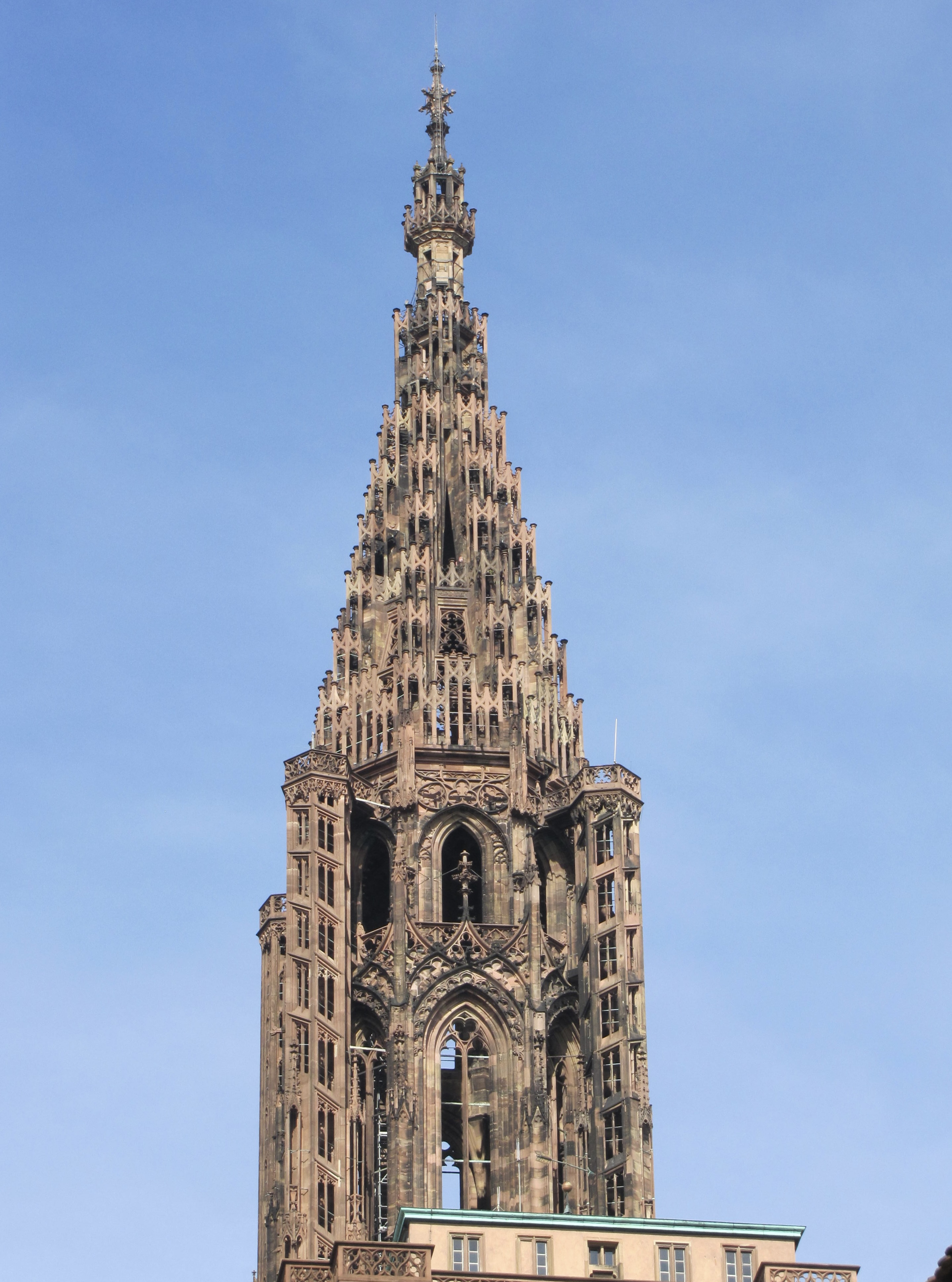 Alsace, Bas-Rhin, Cathédrale Notre-Dame de Strasbourg (PA00085015). Flèche et plateforme